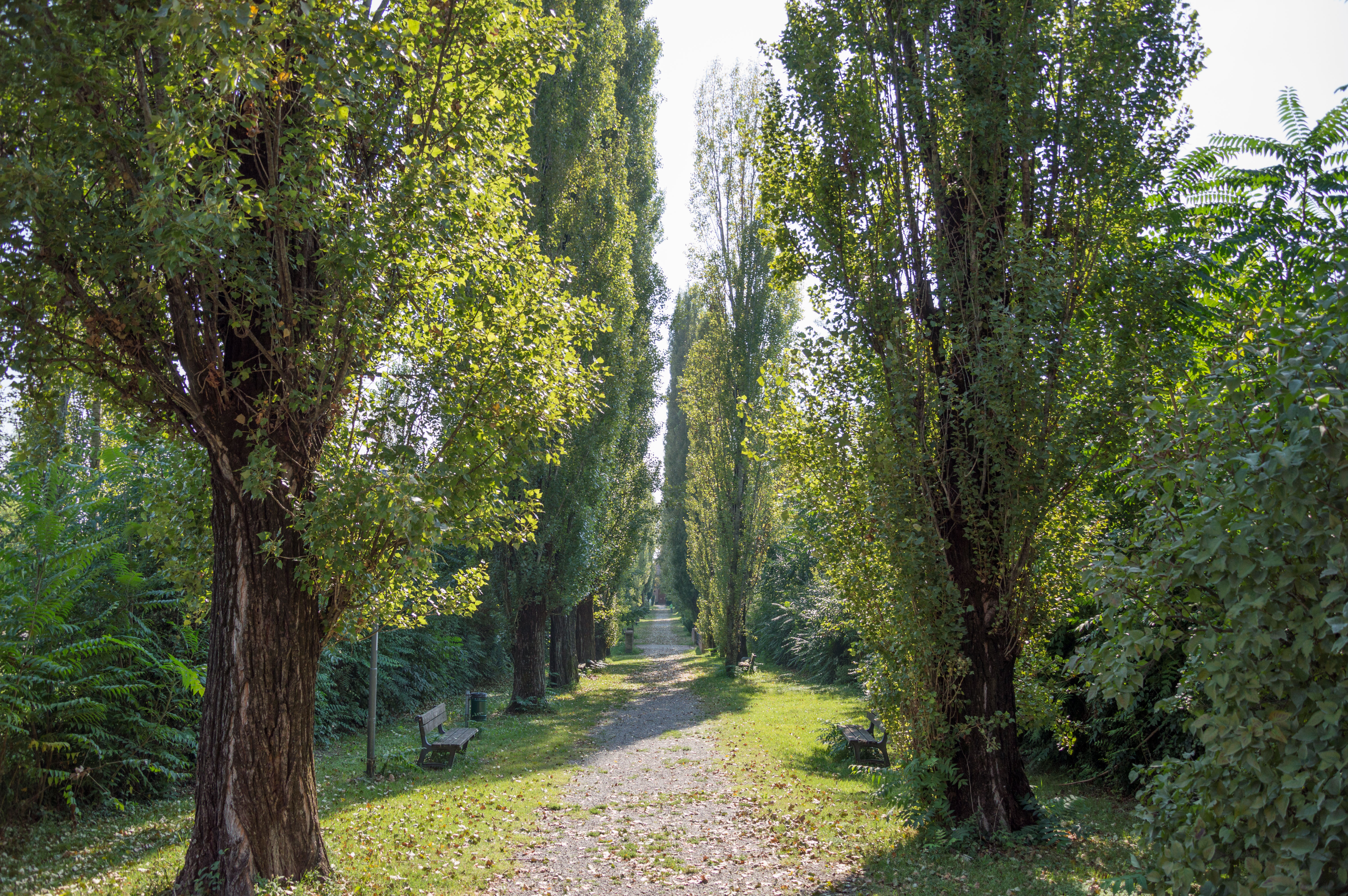 Il Mauriziano This is a photo of a monument which is part of cultural heritage of Italy.